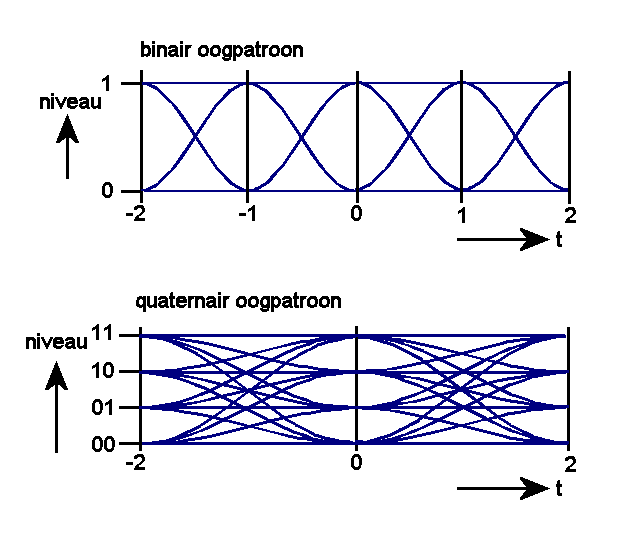 oogpatroon datasignaal met 4-niveau's